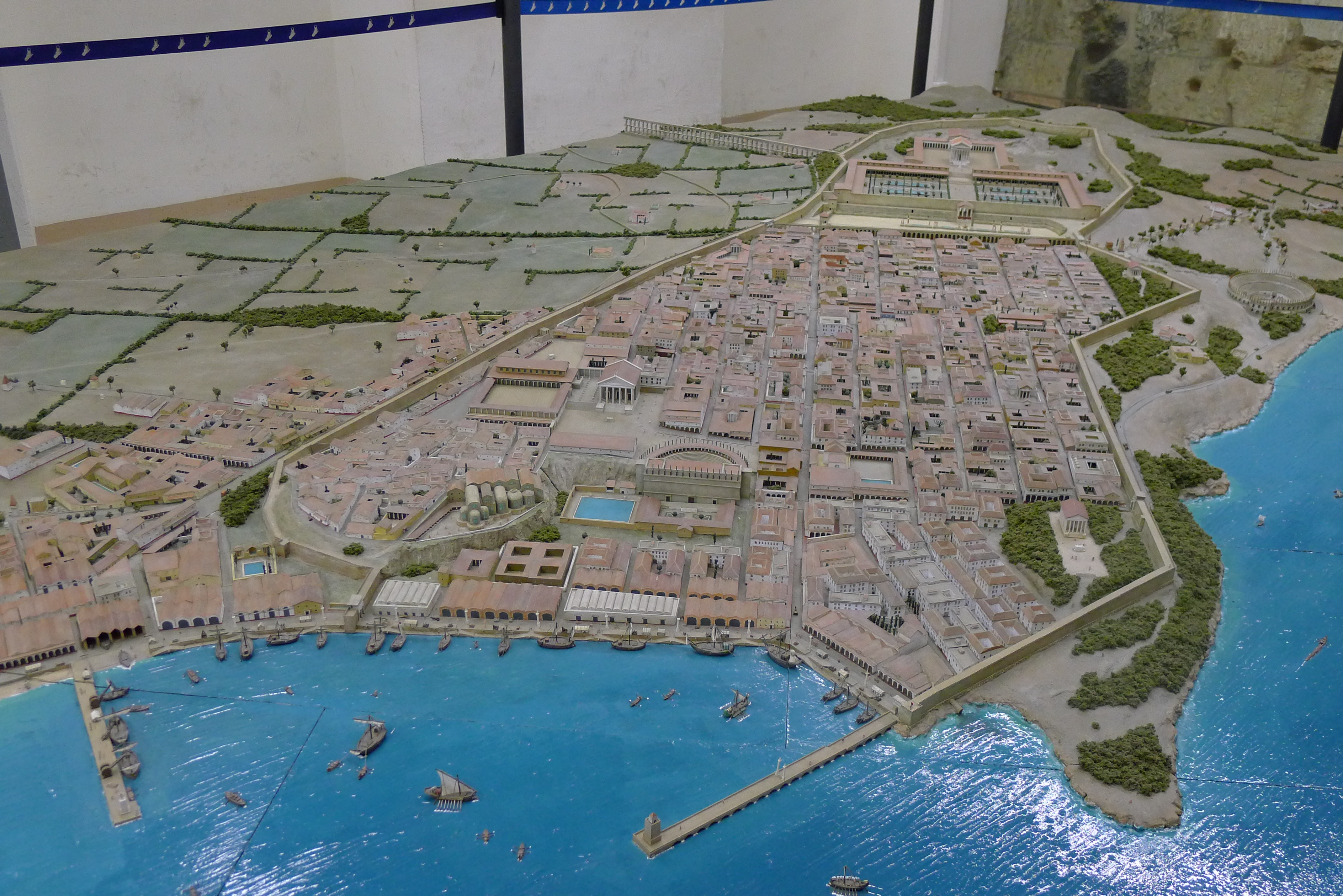 Tarraco, Modell der hohen Kaiserzeit, Blick von Süden; aufgenommen im Museu d´Història de Tarragona